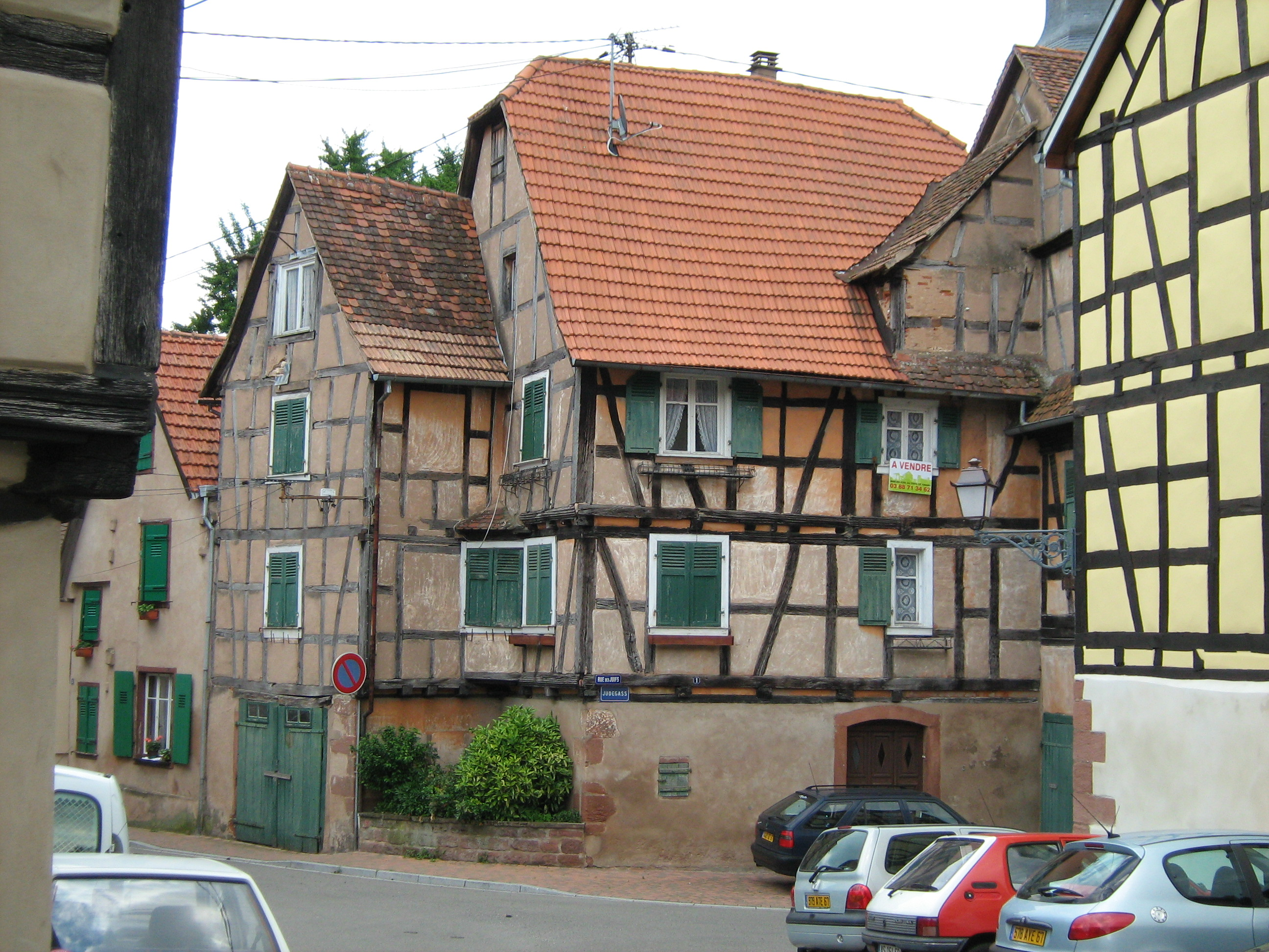 Immeubles de la rue des Juifs à Bouxwiller, Bas-Rhin, France